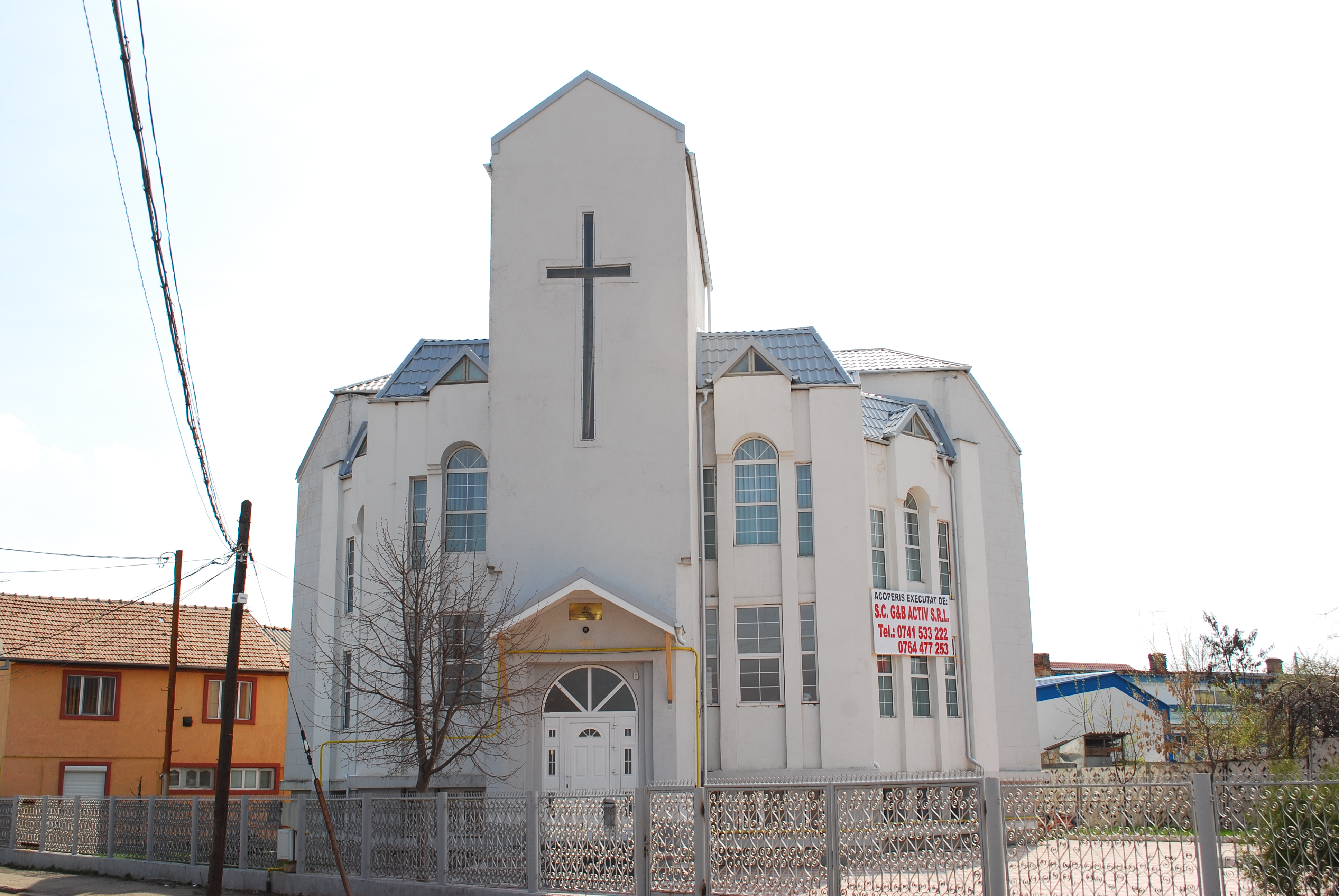 Biserica adventistă din Buzău, România